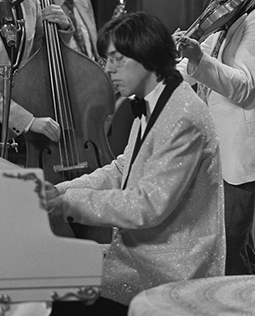 Erik Brey in de Nederlandse televisieserie De lachende scheerkwast in 1981